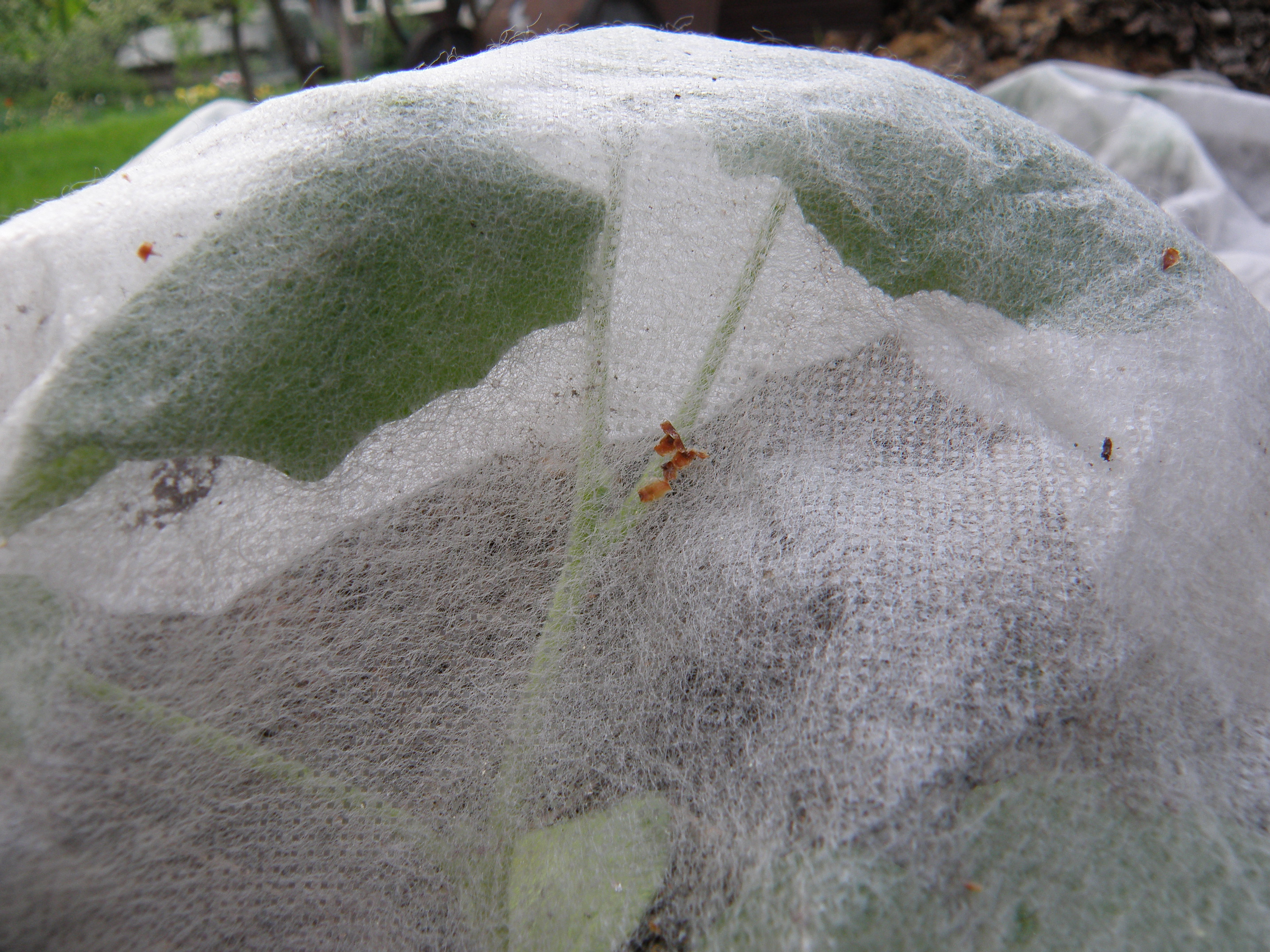 Kõrvitsataim katteloori all